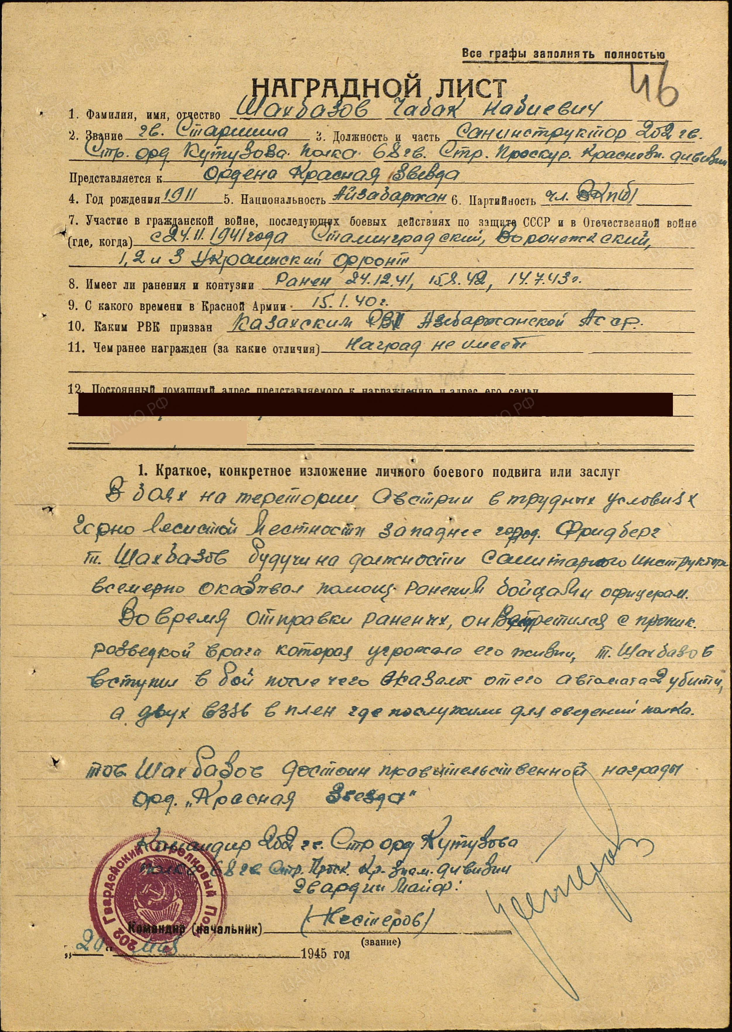 Наградной лист - Орден Красной Звезды